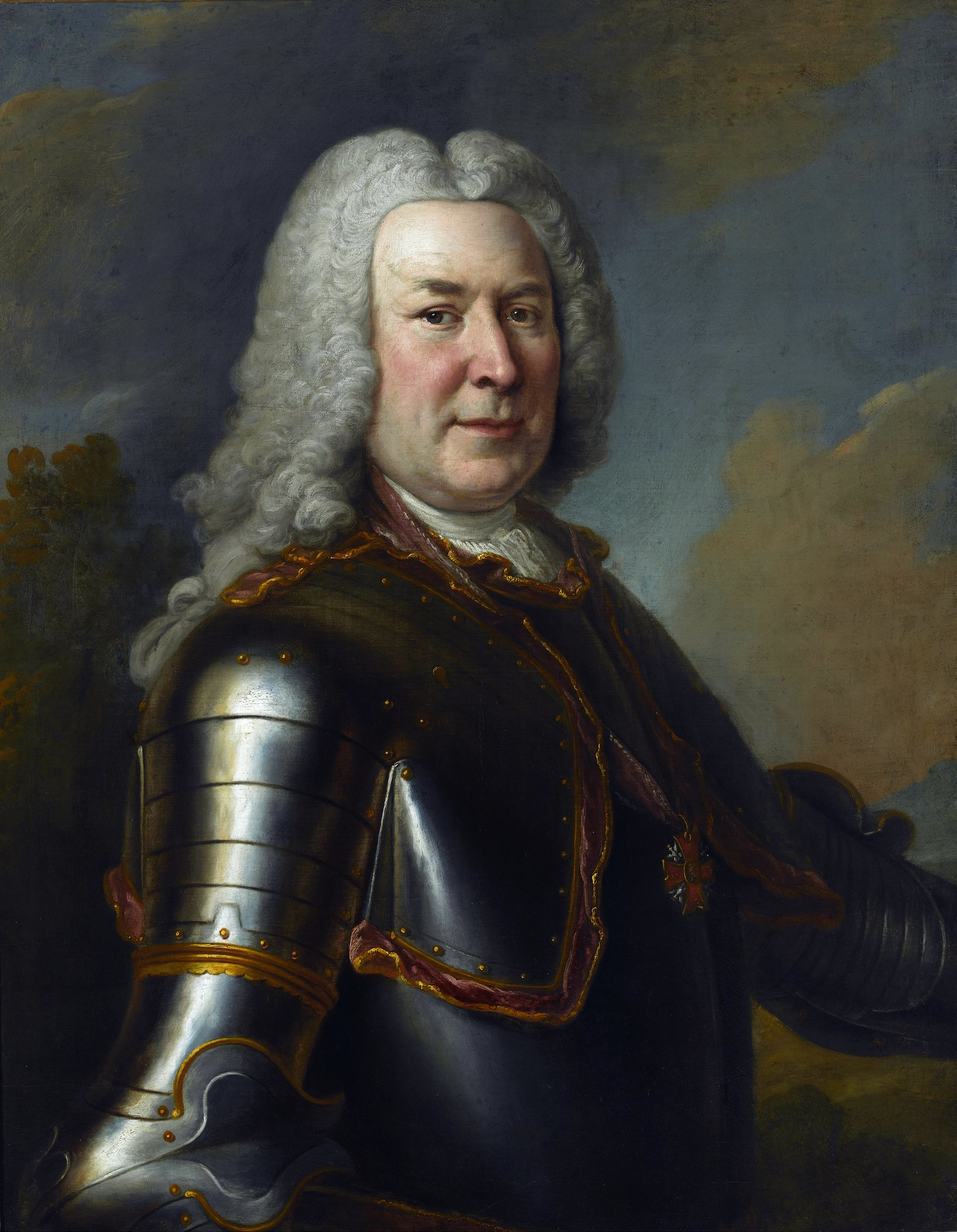 Беларуская (тарашкевіца): Партрэт Міхала Фрыдэрыка Чартарыйскага (Michał Fryderyk Čartaryjski)